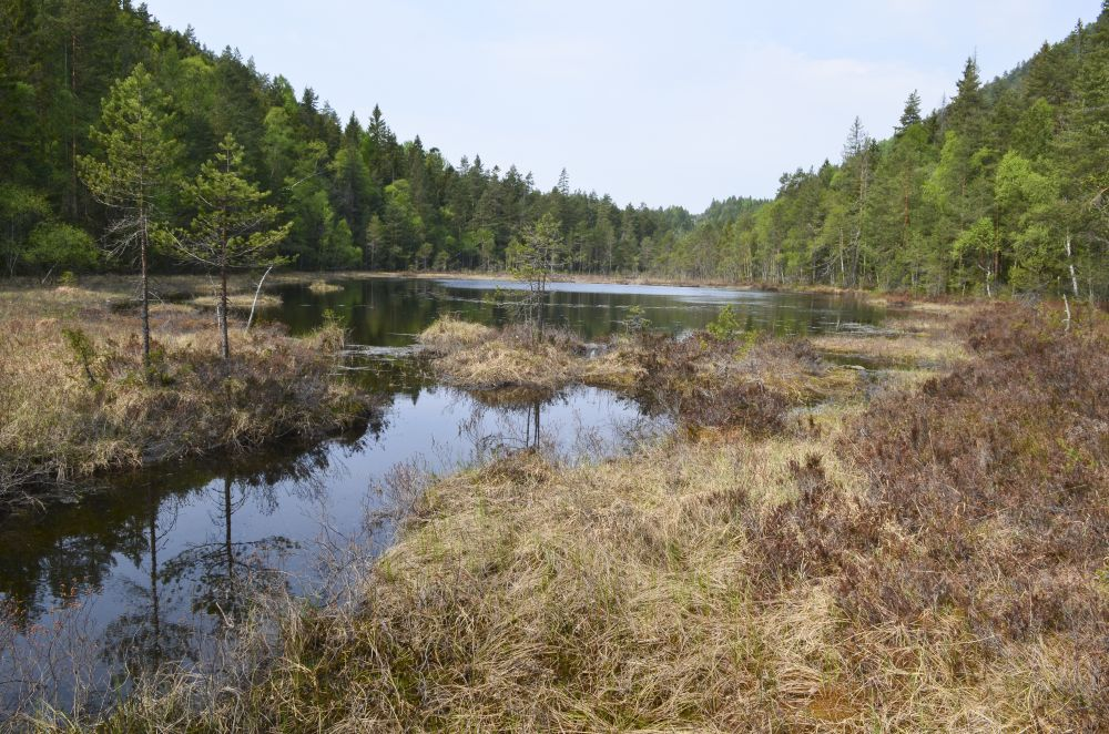 Tjønna er en jordvannsmyr som er lite påvirket av menneskelig aktivitet.